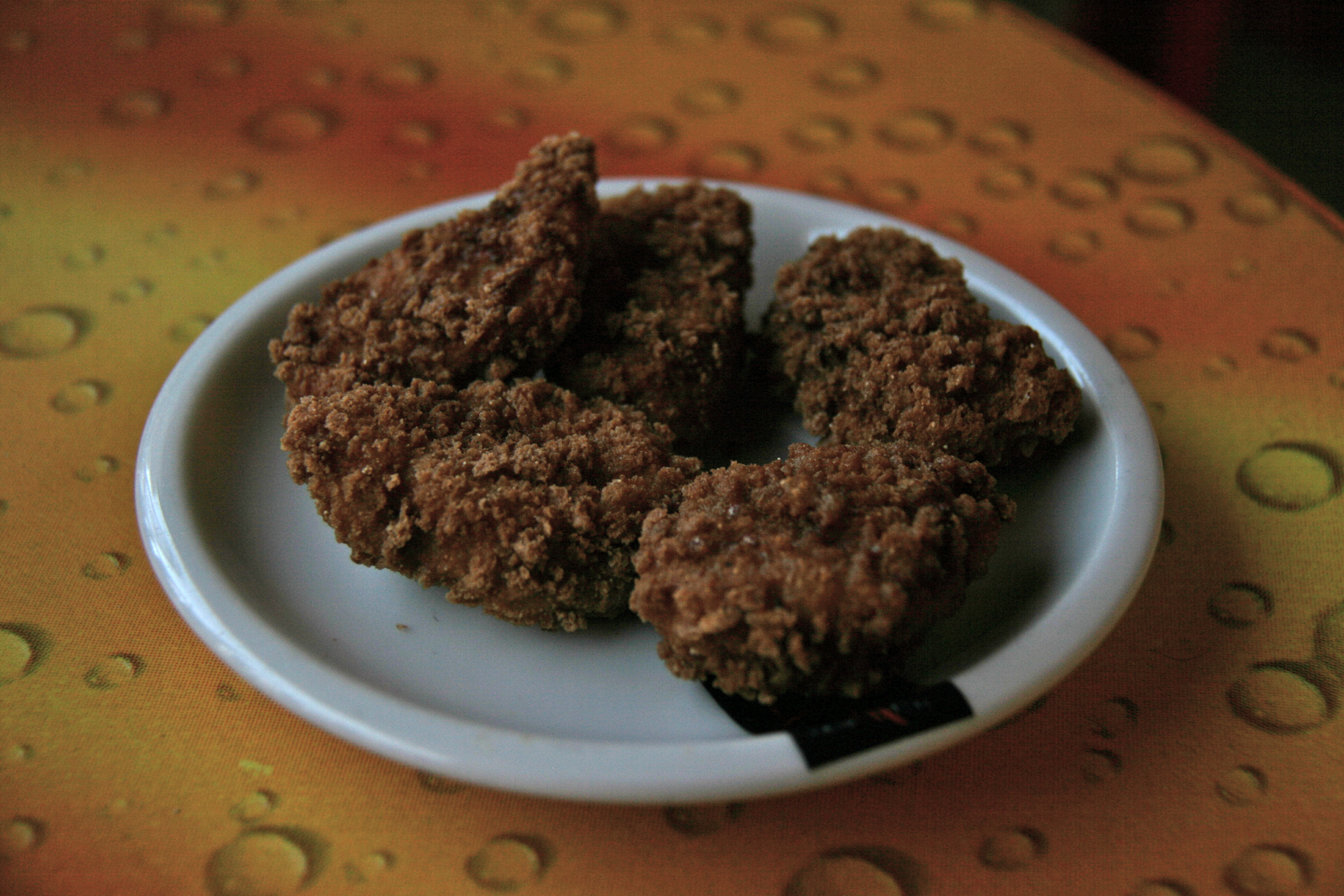 Tapas de pollo rebozado y frito